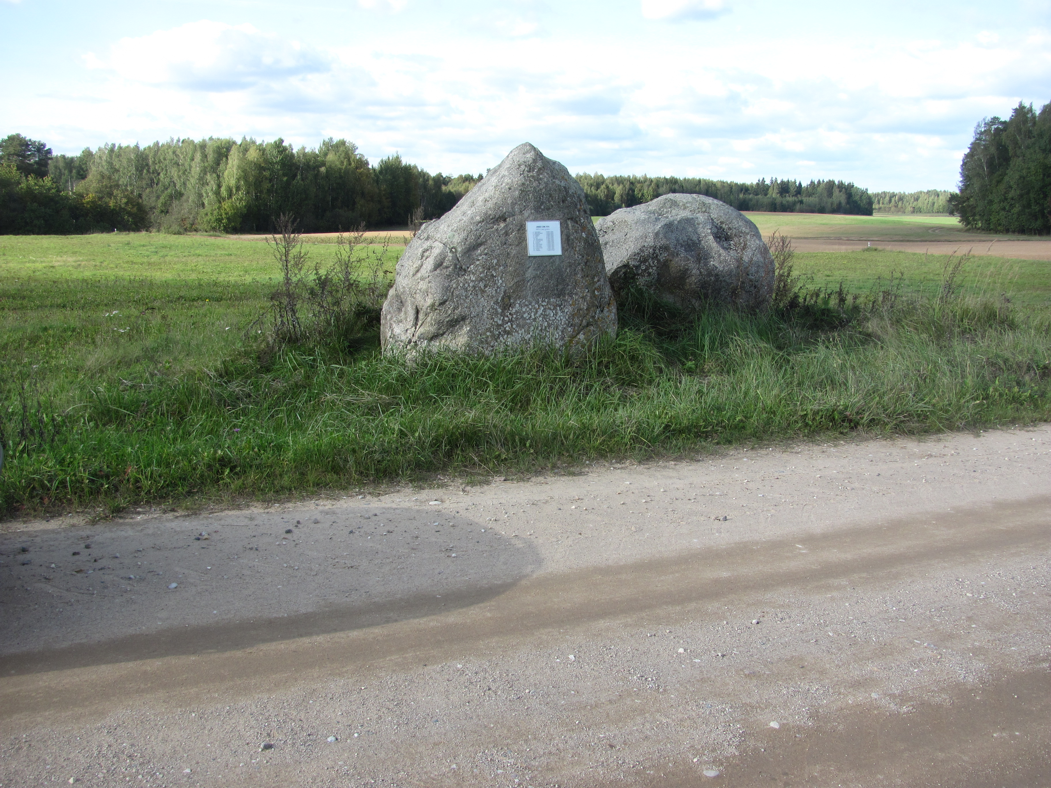 Kriaunų sen., Lithuania